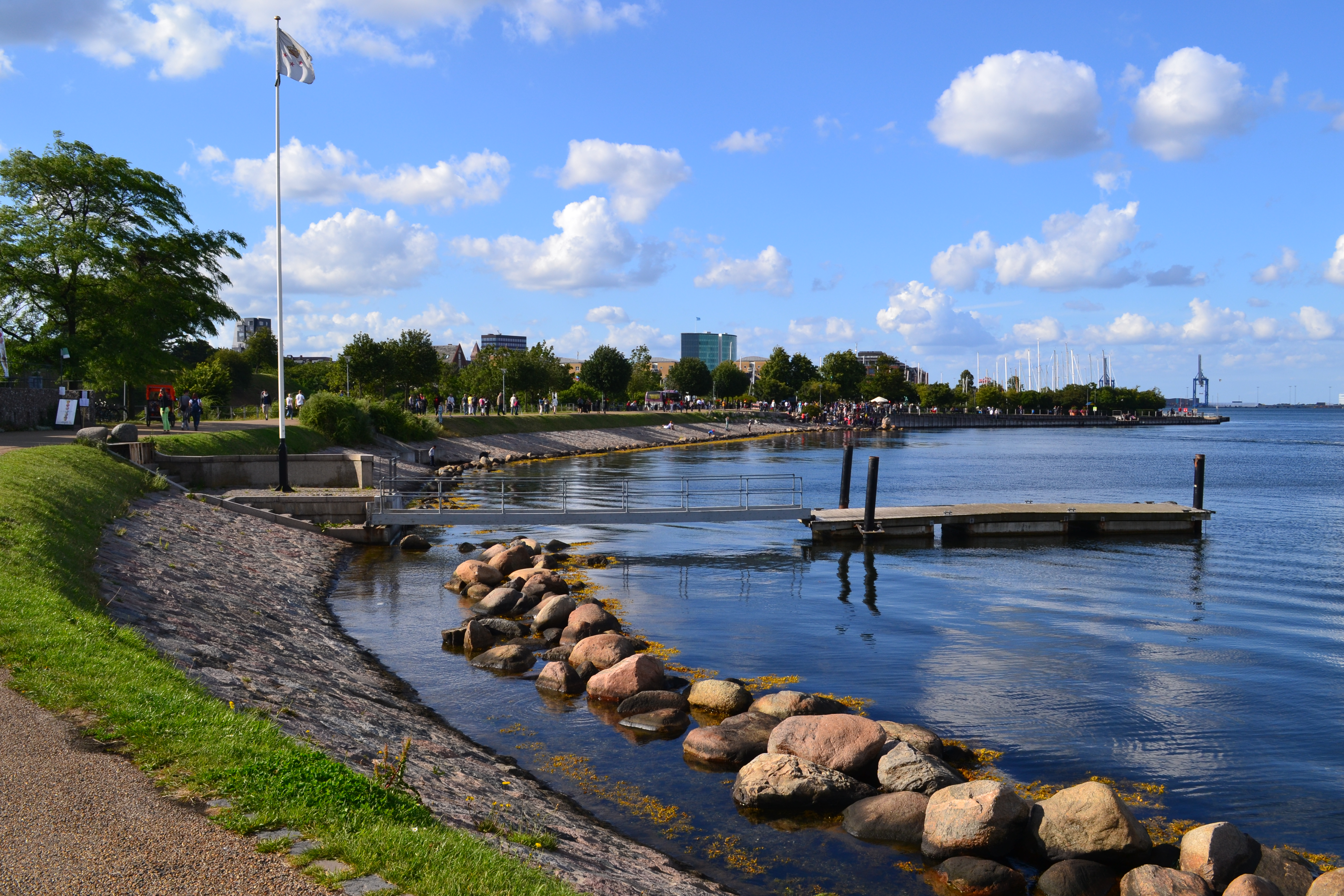 Promenade in Kopenhagen neben der Statur der Kleinen Meerjungfrau